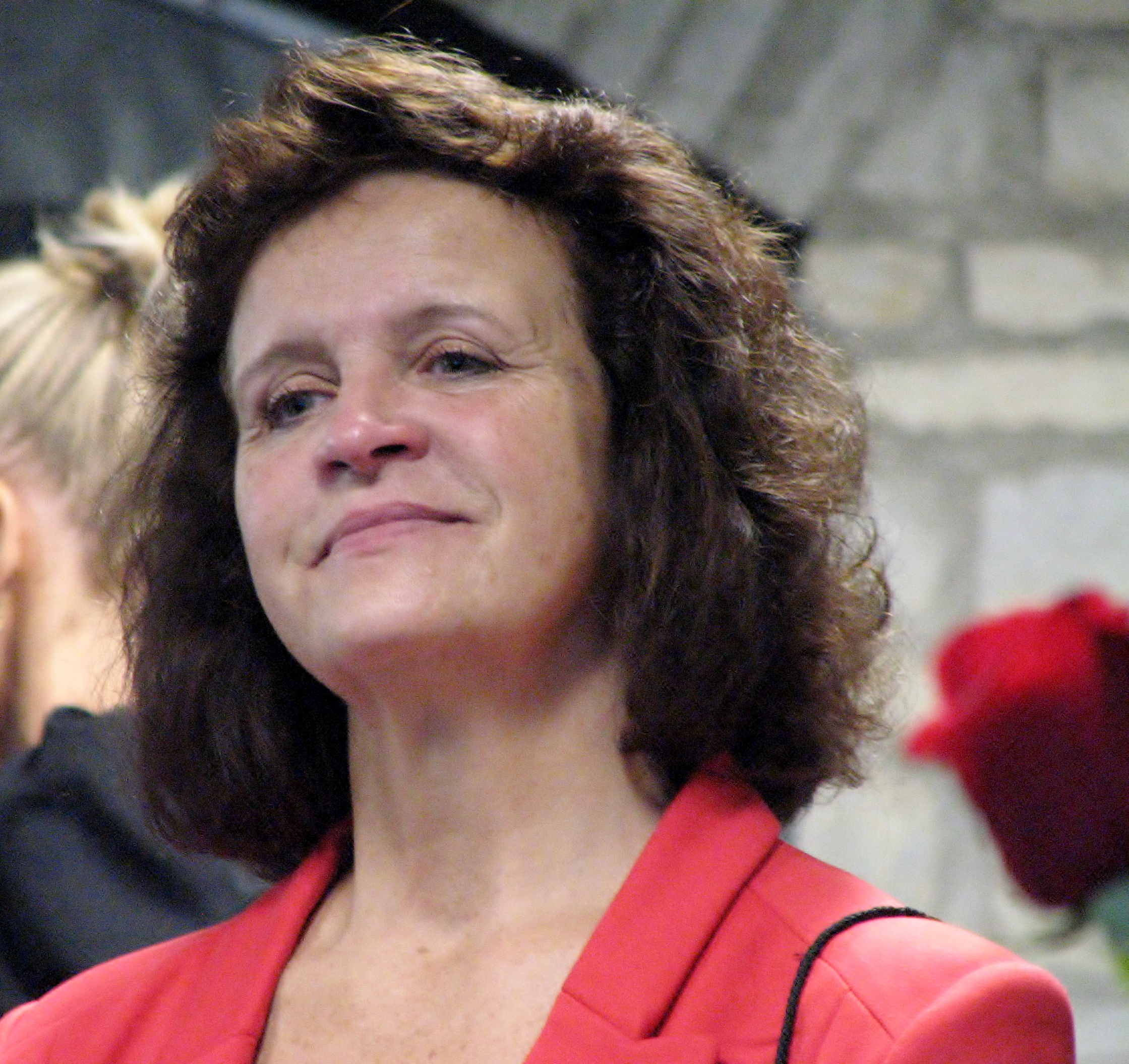 Riina Hein Rahvusraamatukogu Eesti üldlaulupidude nootide digitaalkogu esitlusel